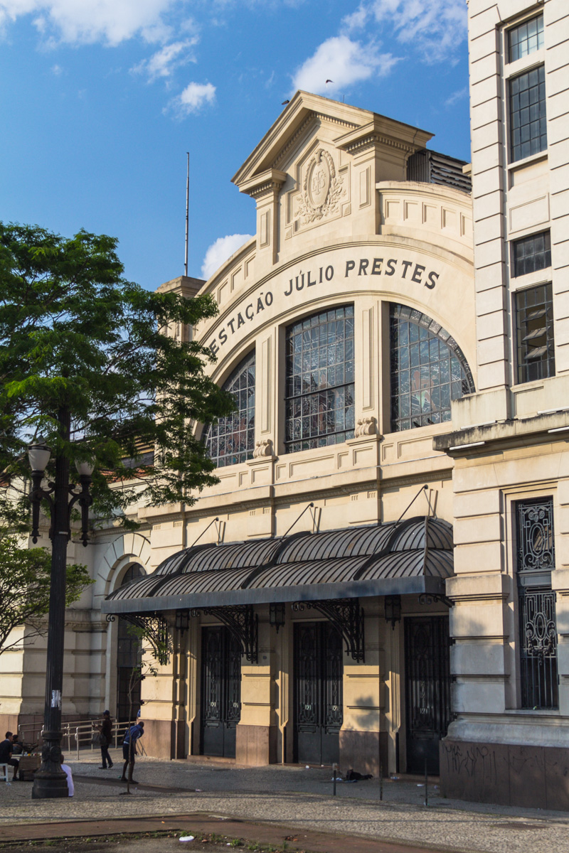 Estaçao Julio Prestes,Sao Paulo,2013